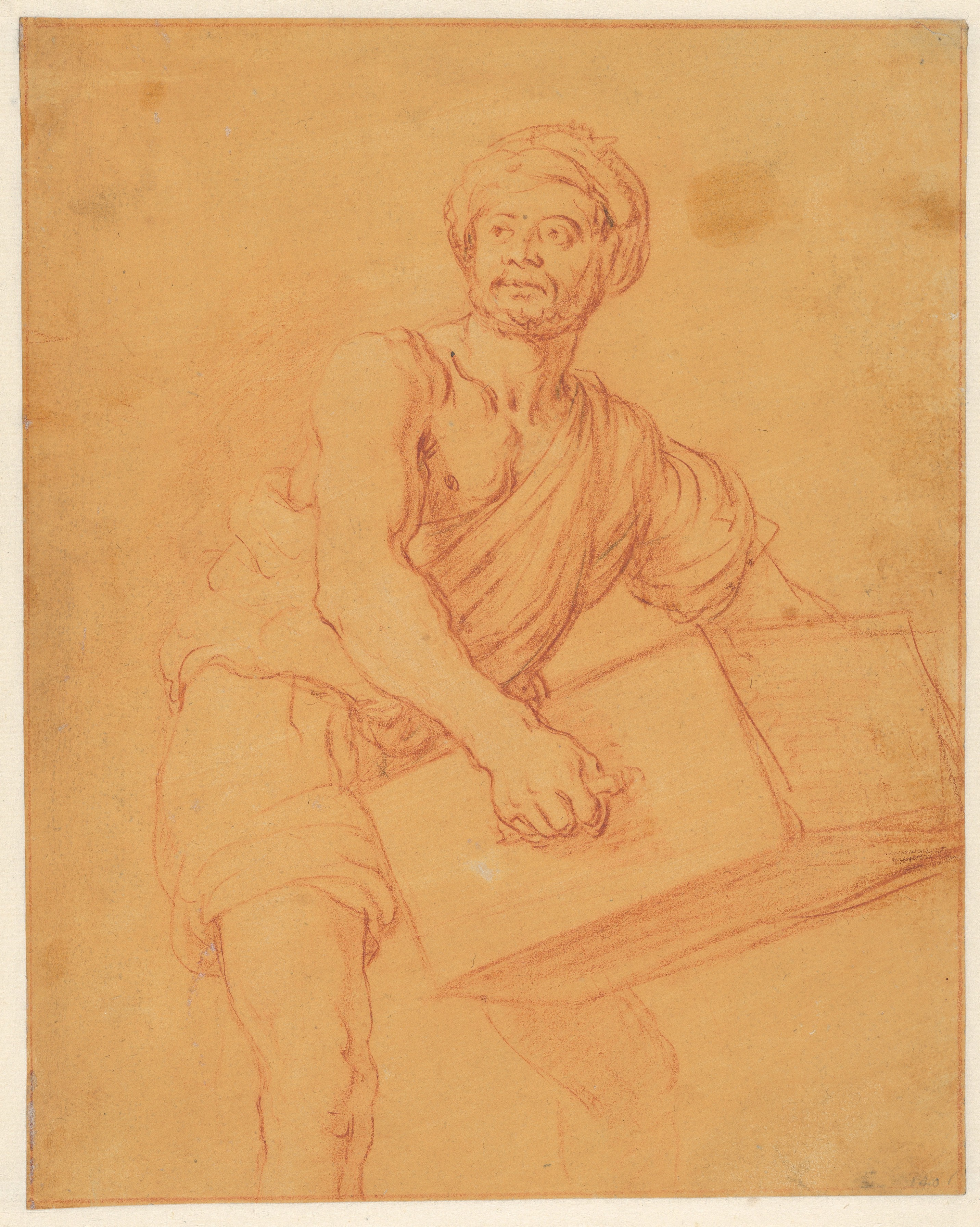 Drawing; Drawings